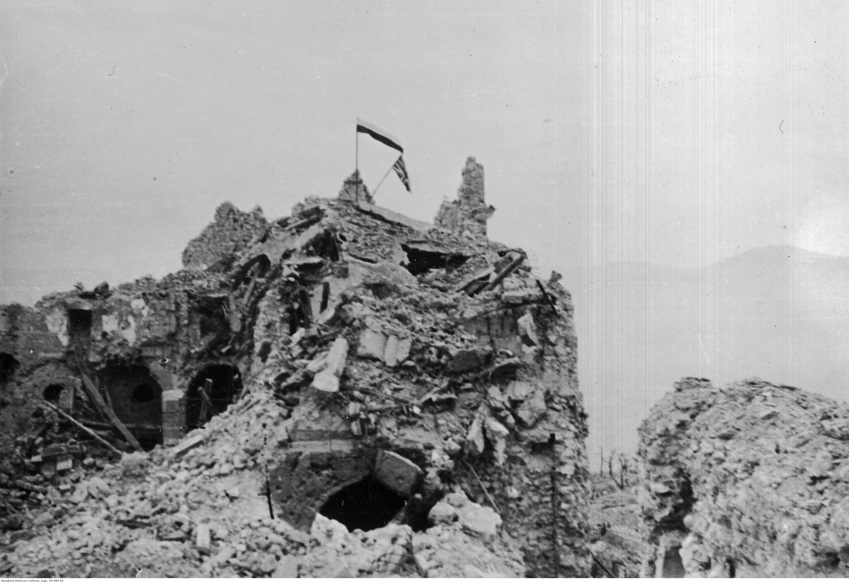 Flagi polska i brytyjska powiewające nad ruinami klasztoru na Monte Cassino. Archiwum Fotograficzne Tadeusza Szumańskiego. Sygnatura: 24-452-15